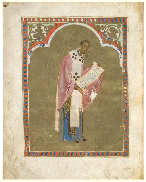 СЛУЖЕБНИК ВАРЛААМА ХУТЫНСКОГО Первая четверть XIII века 20 л. Пергамен; чернила, киноварь, темпера, твореное золото; переплет – картон, кожа 25 х 20 х 1,8 Поступил в 1920 году в составе Синодальной патриаршей библиотеки На л. 13 запись XVII века: Служебник великого чудотворца Варлаама ево собинной прислал ему из Царяграда Никифор патриарх Происходит из Хутынского монастыря в Великом Новгороде Реставрирован в 1995 году в ВХНРЦ им. И.Э. Грабаря Г.З. Быковой ГИМ инв. 80370, ОР Син. 604